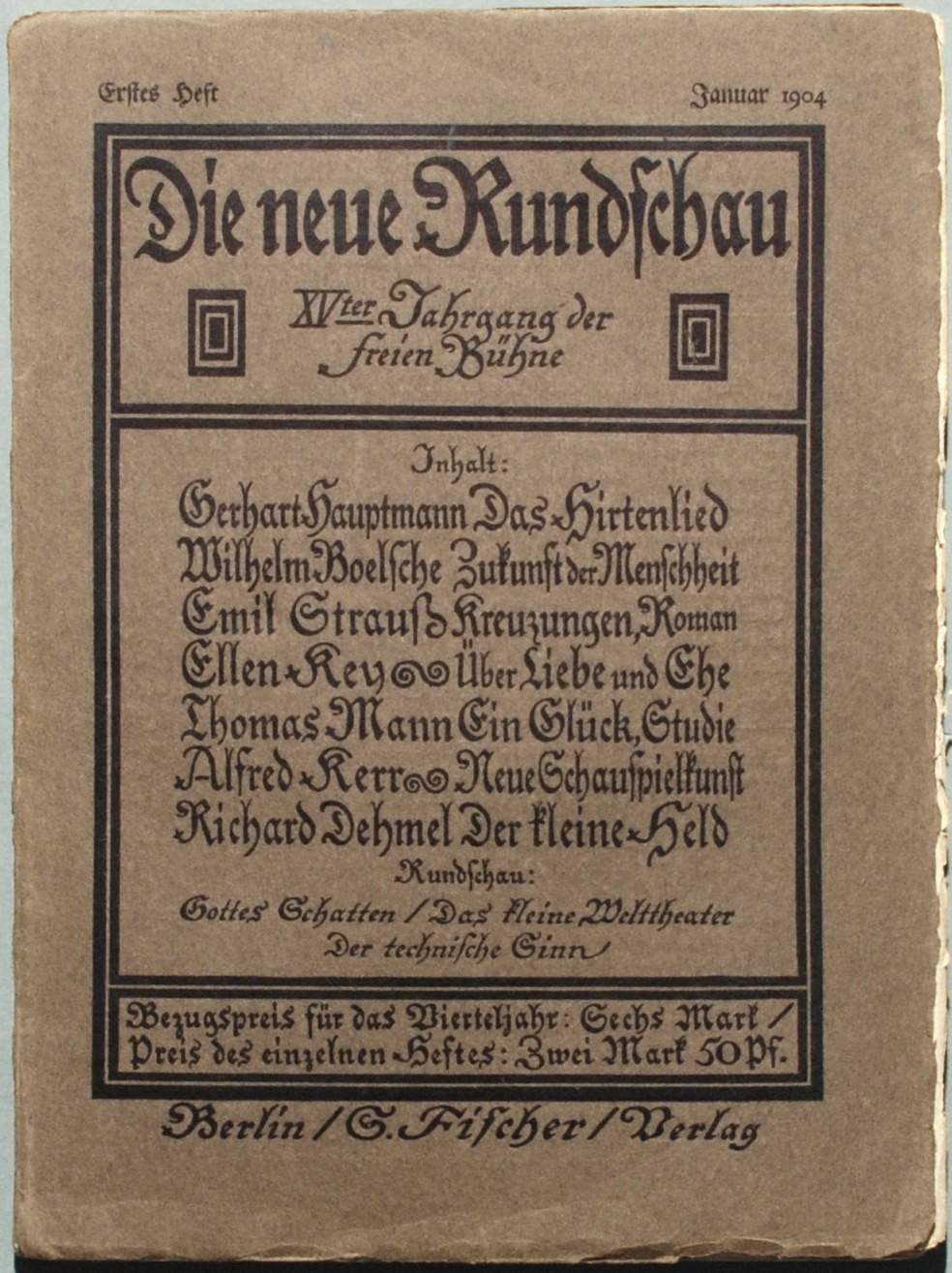 «Die neue Rundschau» Erstes Heft Januar 1904. Berlin S. Fischer Verlag. Enthält Thomas Mann: Ein Glück. Studie.